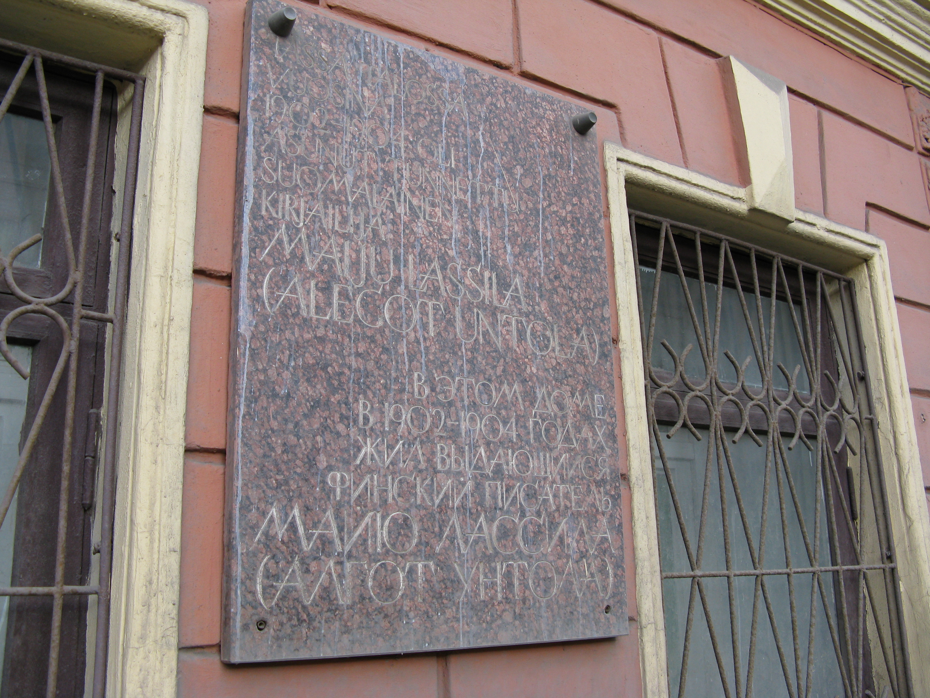 Lesnoy avenue - Komissara Smirnova Street (St.-Petersburg, Russia)